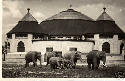 Das alte Elefantenhaus als Postkartenmotiv (1932)